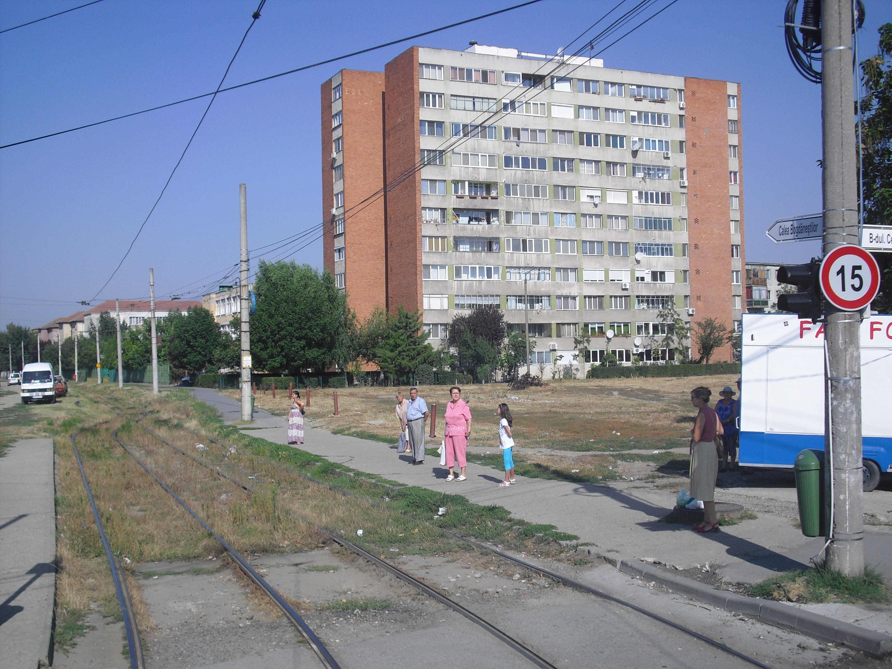 Straßenbahn in Timişoara (Rumänien)